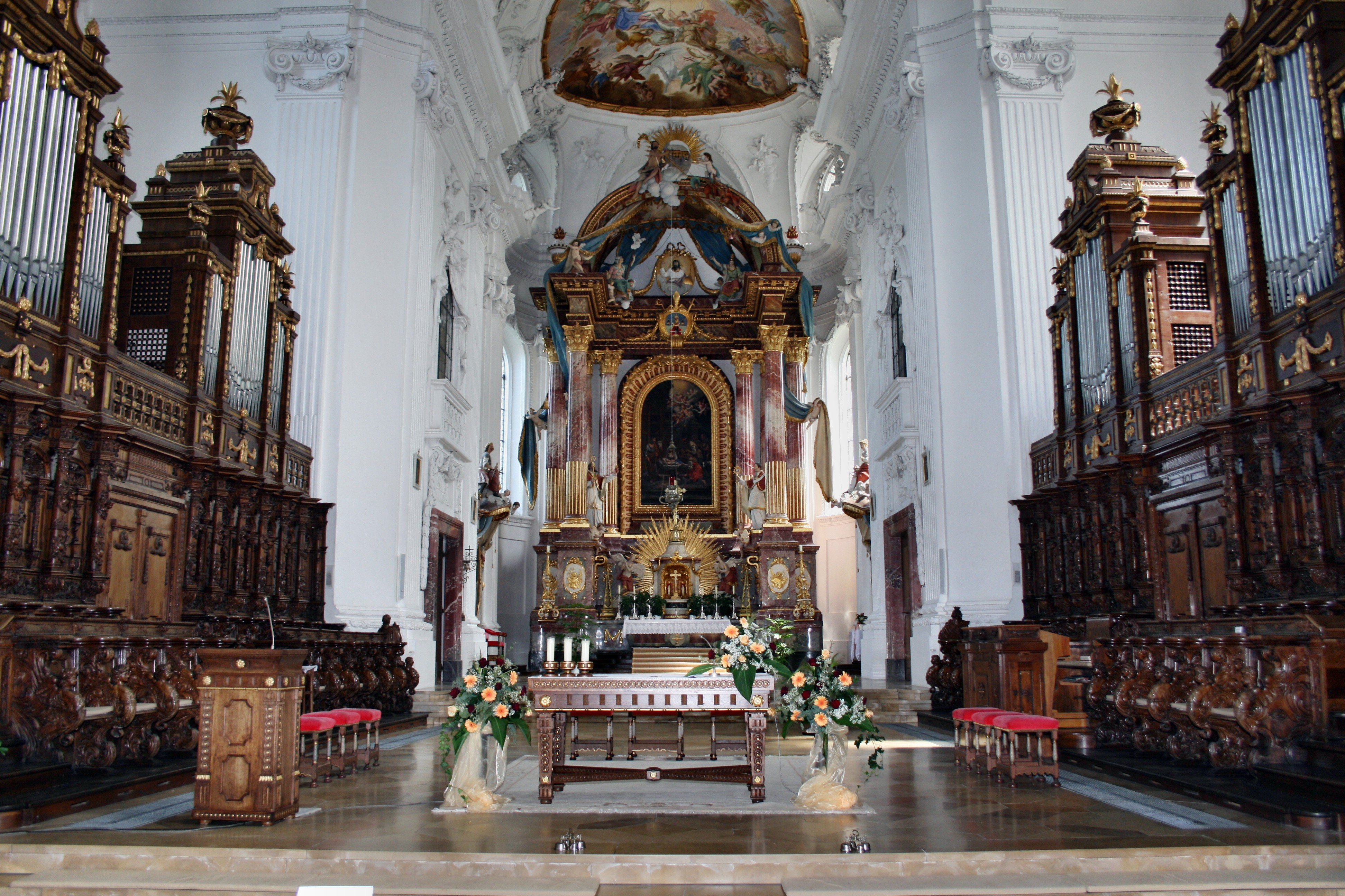 St Verena, Rot an der Rot, Chorbereich